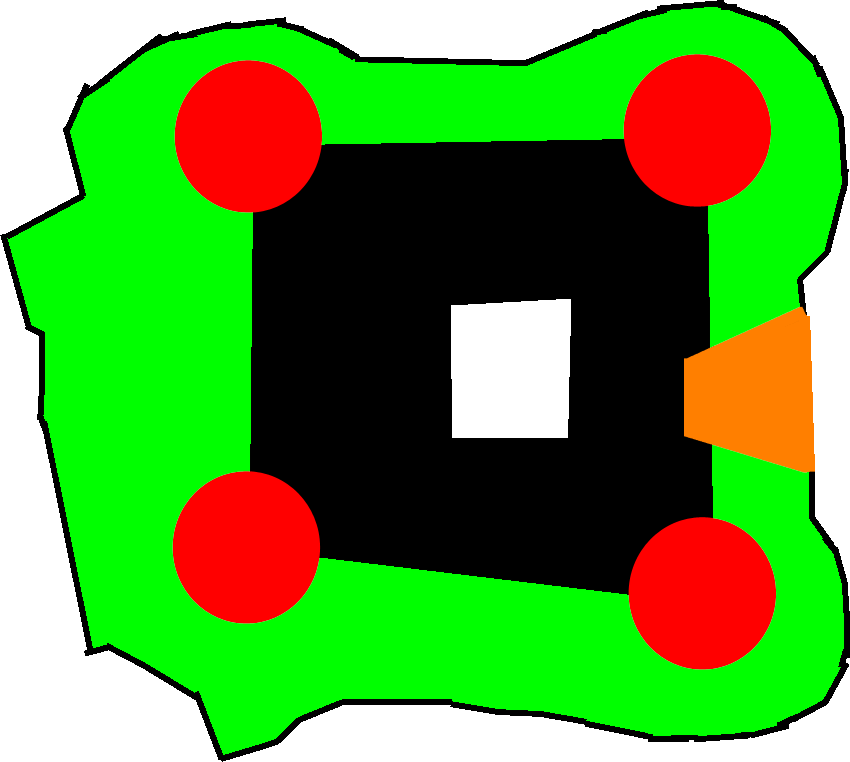 castello corigliano d'otranto visto dall'alto